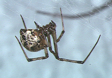 female Parasteatoda tepidariorum from Okinawa.